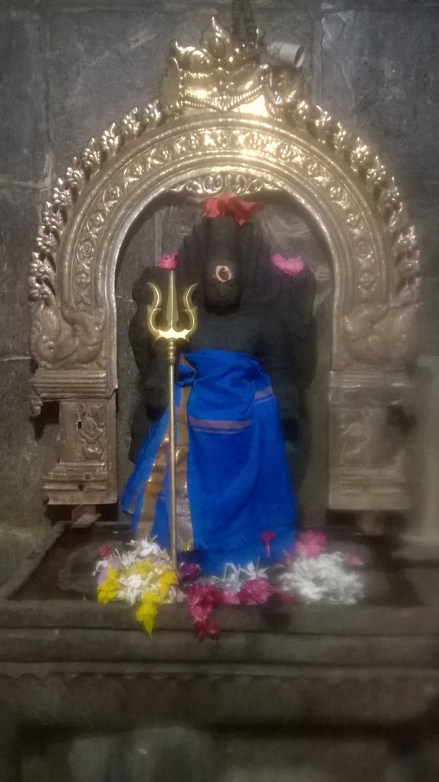 மூலவர் வைரவர் பெருமான்